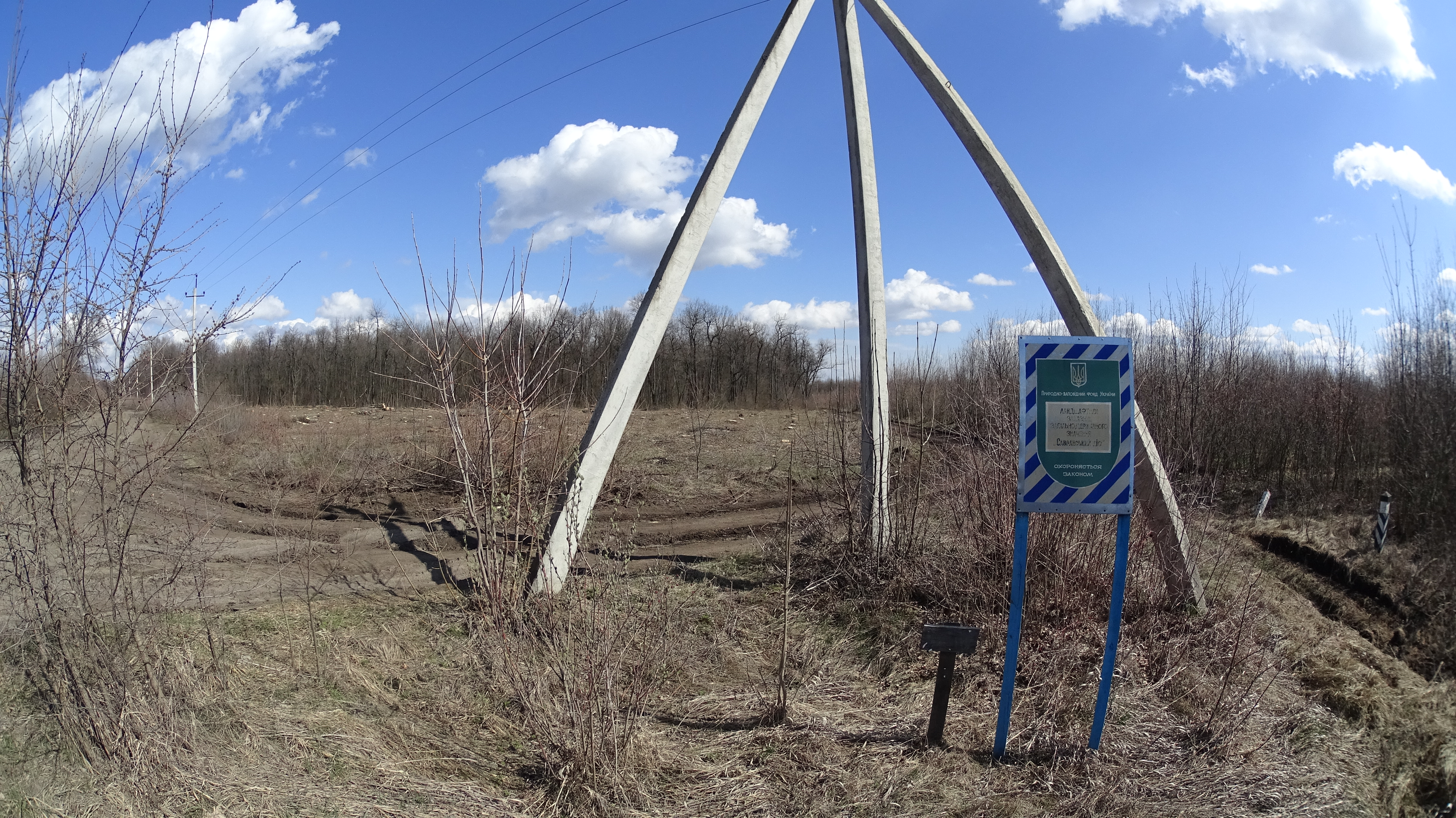 «Савранський ліс», Савранський р-н, Савранське л-во кв. 1-40, Слюсарівське л-во кв.1-3, 5-16, 19-71, Осичанського л-во кв.1-34